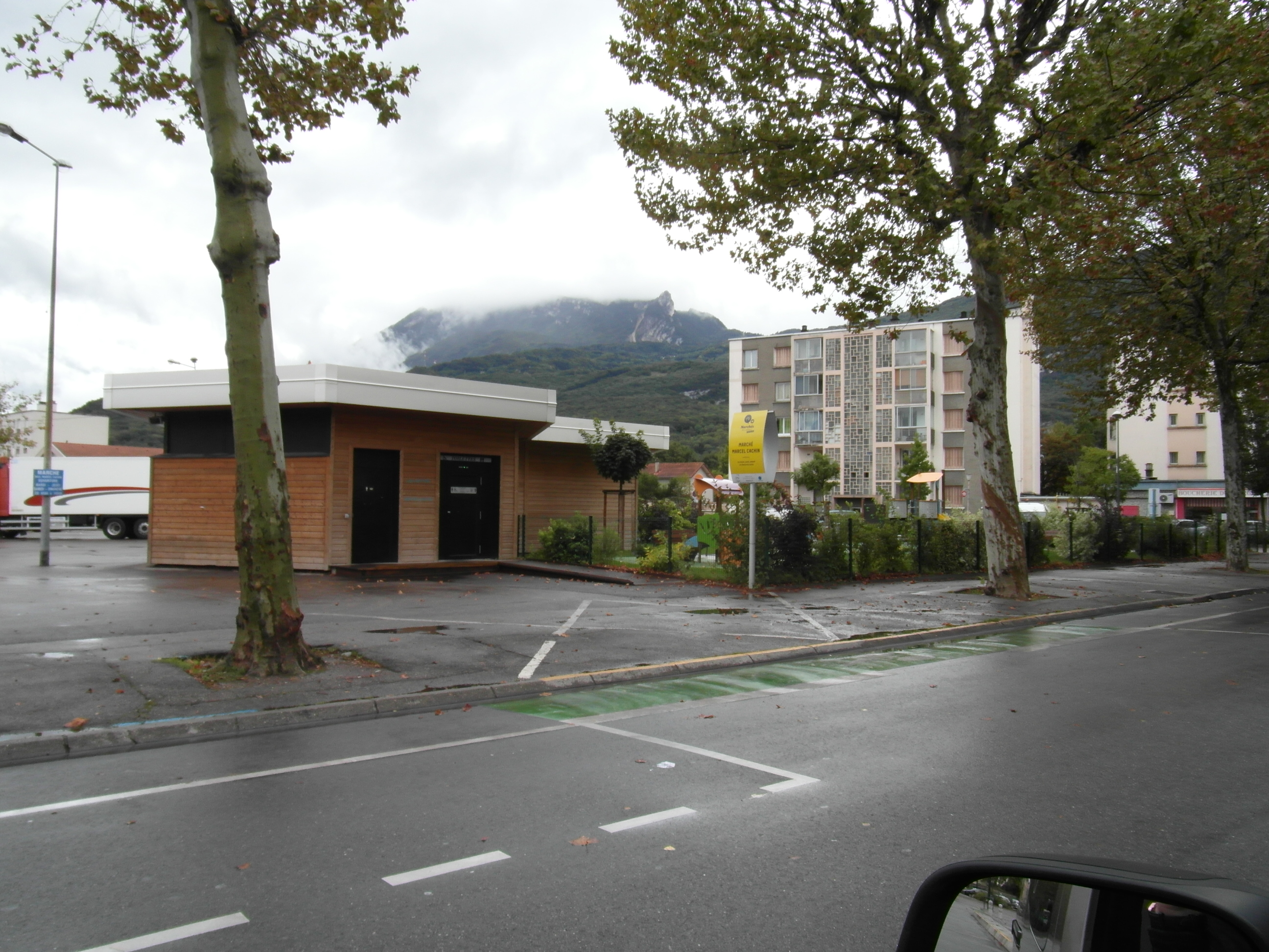 Place du Marché Marcel Cachin